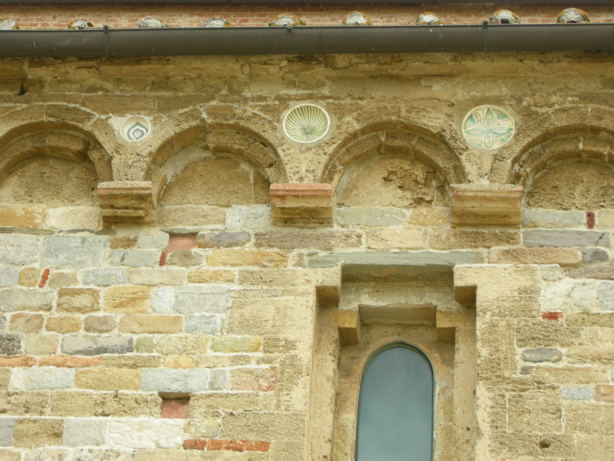 Basilica di san piero a grado, esterno